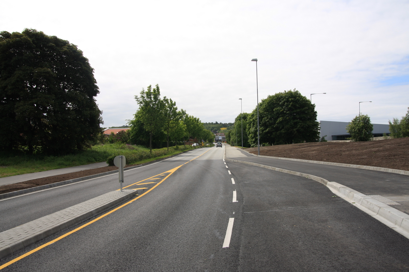 Fylkesvei 393 Rogaland, På den andre siden av motorveien kan en se Sørmarka arena